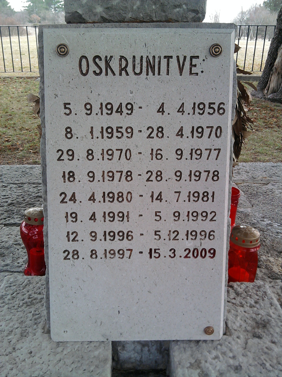 Spomenik bazoviškim žrtvam (Ferdo Bidovec, Fran Marušič, Zvonimir Miloš in Alojzij Valenčič).Spisek oskrunitev do leta 2011.